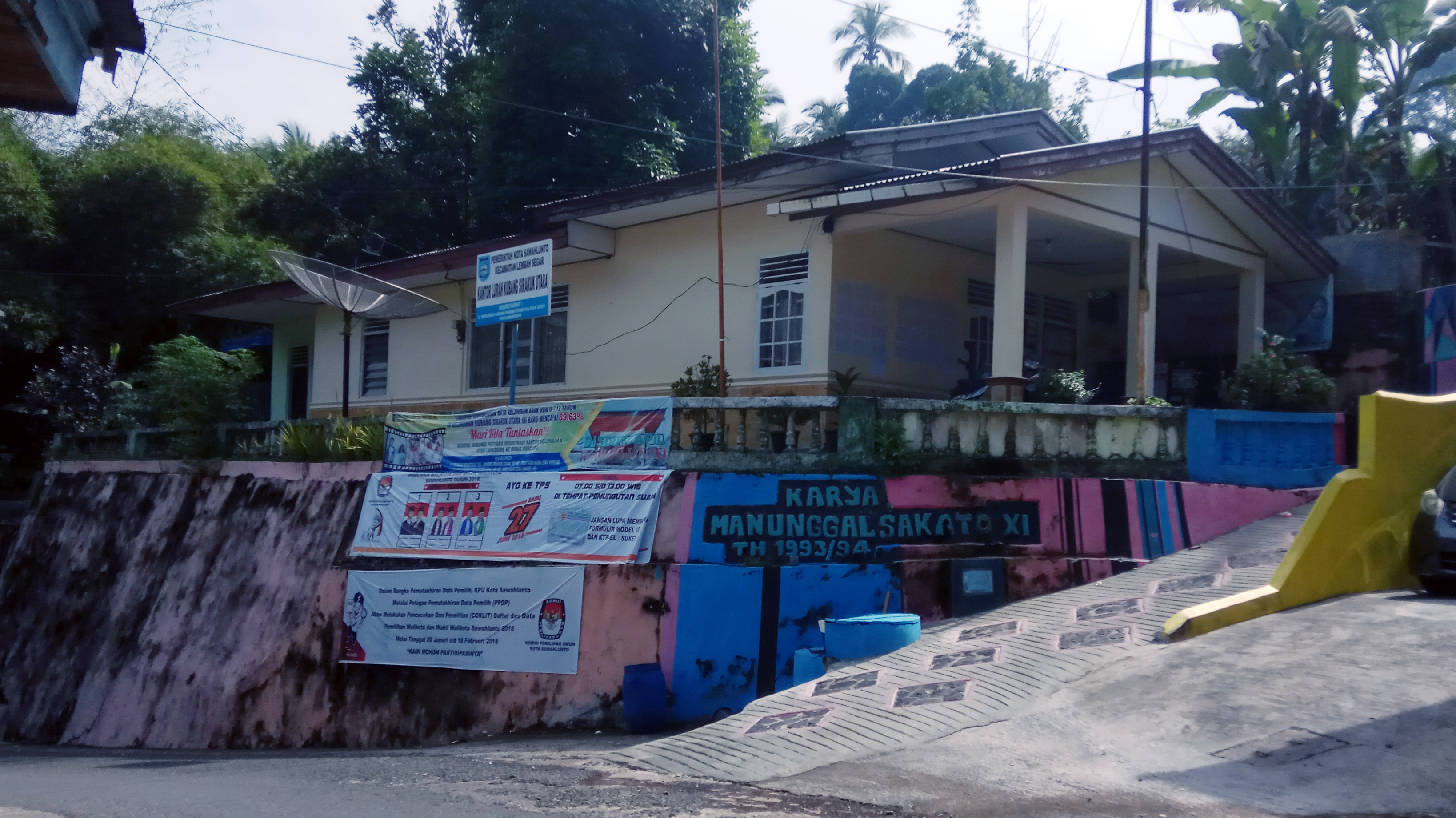 Kantor Lurah Kubang Sirakuak Utara, Lembah Segar, Sawahlunto